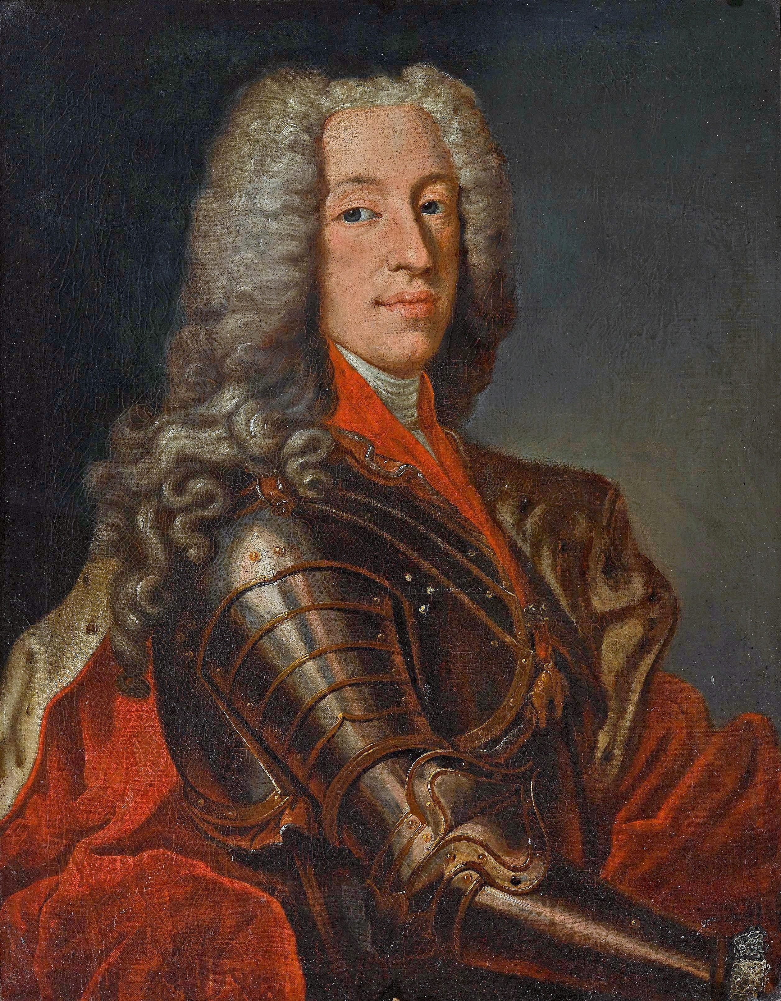 Kurfürst Karl Albrecht von Bayern (1697-1745)